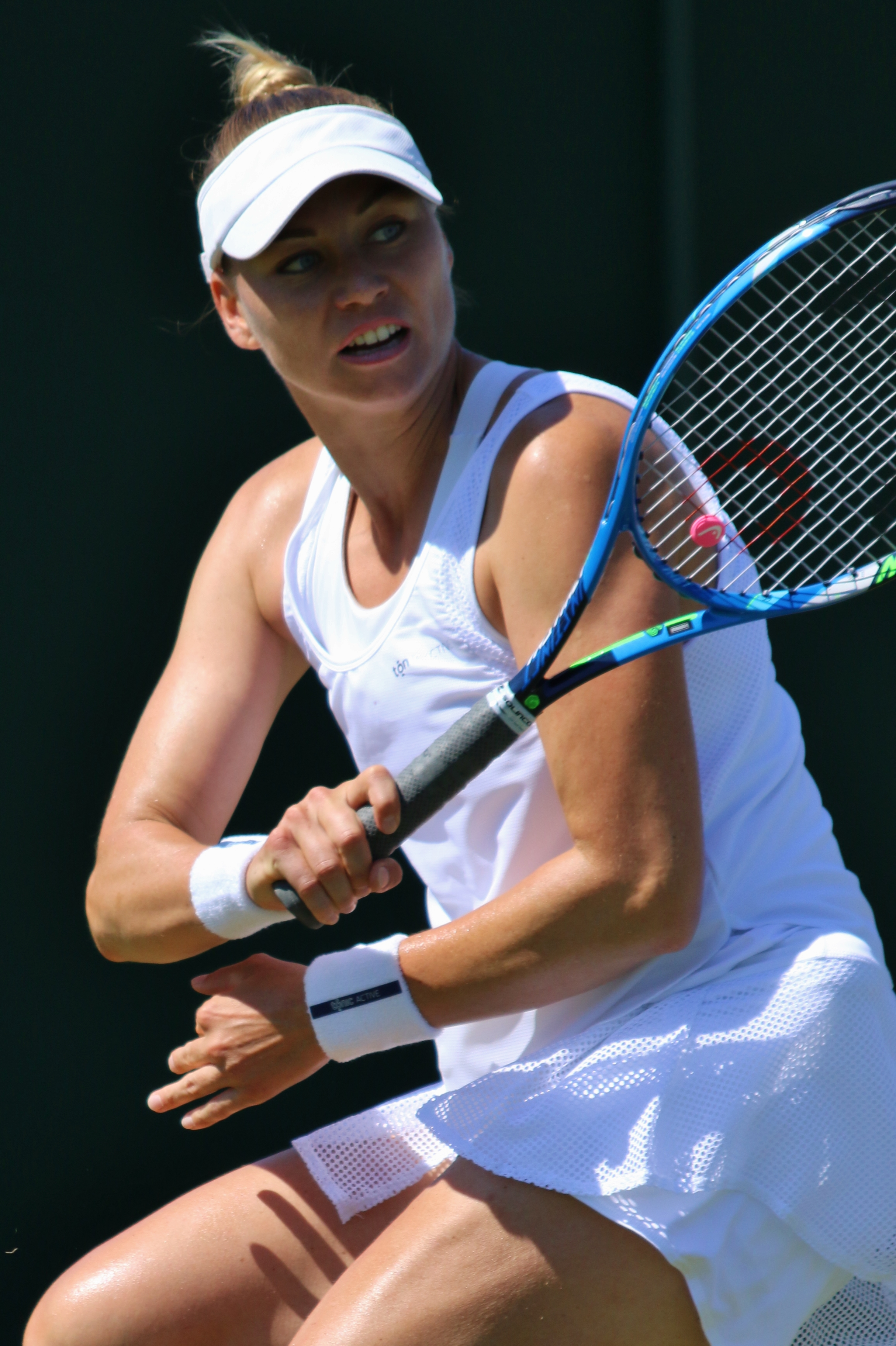 Zvonareva WMQ18 (31)